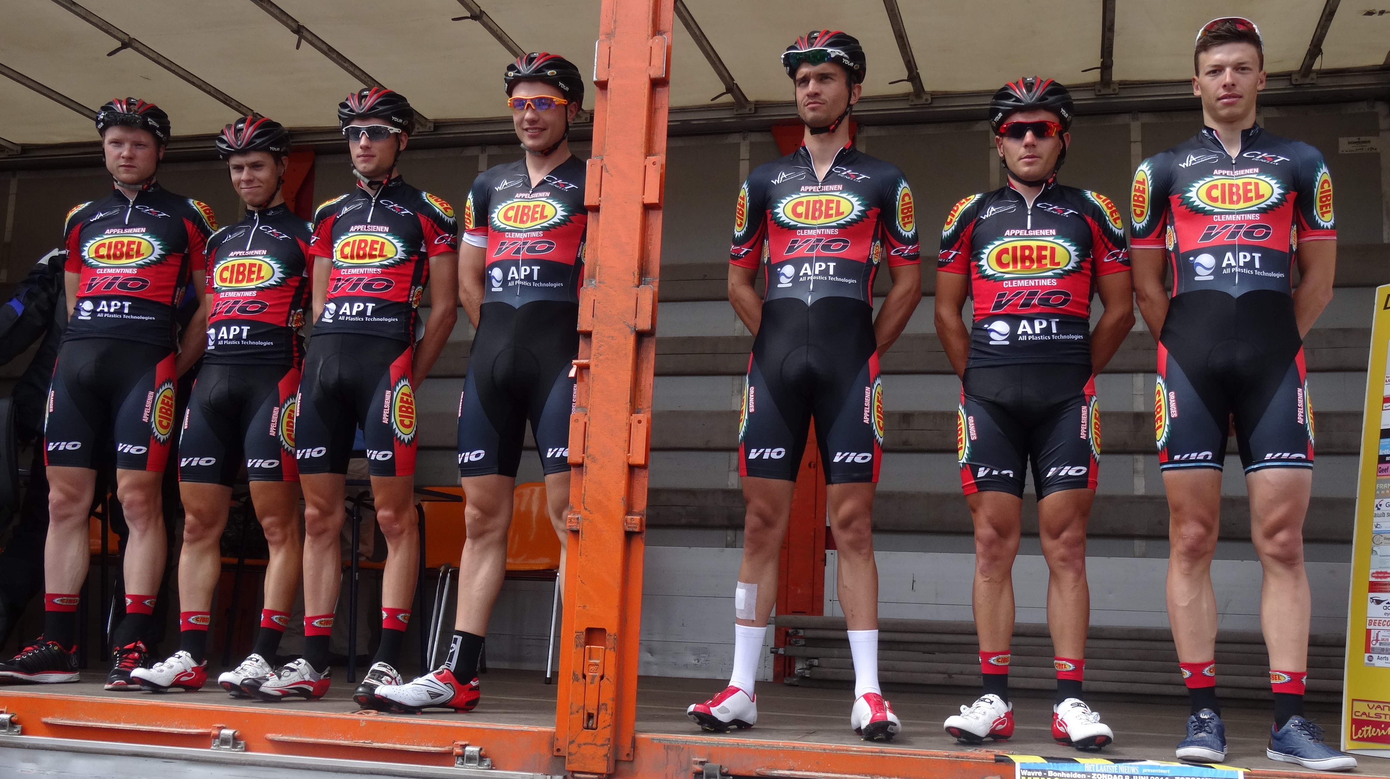 Reportage photographique réalisé le dimanche 8 juin à l'occasion du départ du Mémorial Philippe Van Coningsloo 2014 à Wavre, Belgique.